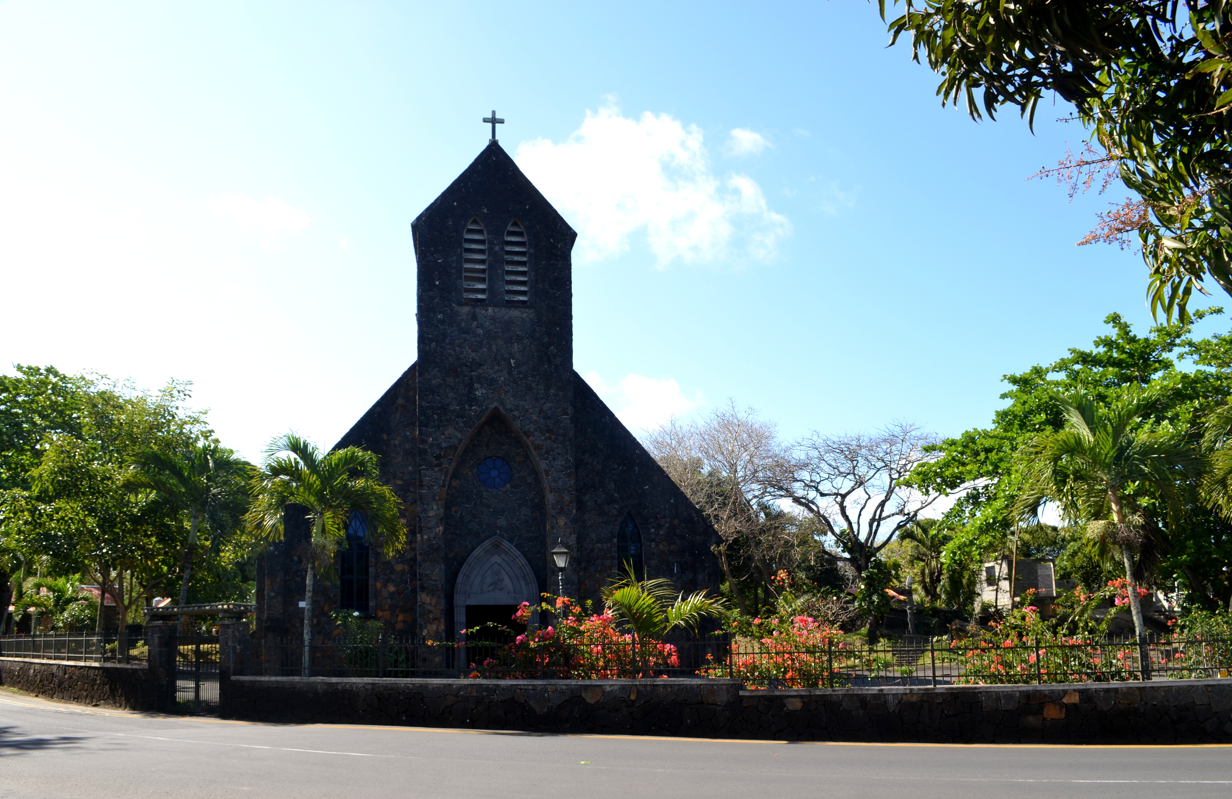 Trou d’Eau Douce, Notre-Dame du Bon Secours